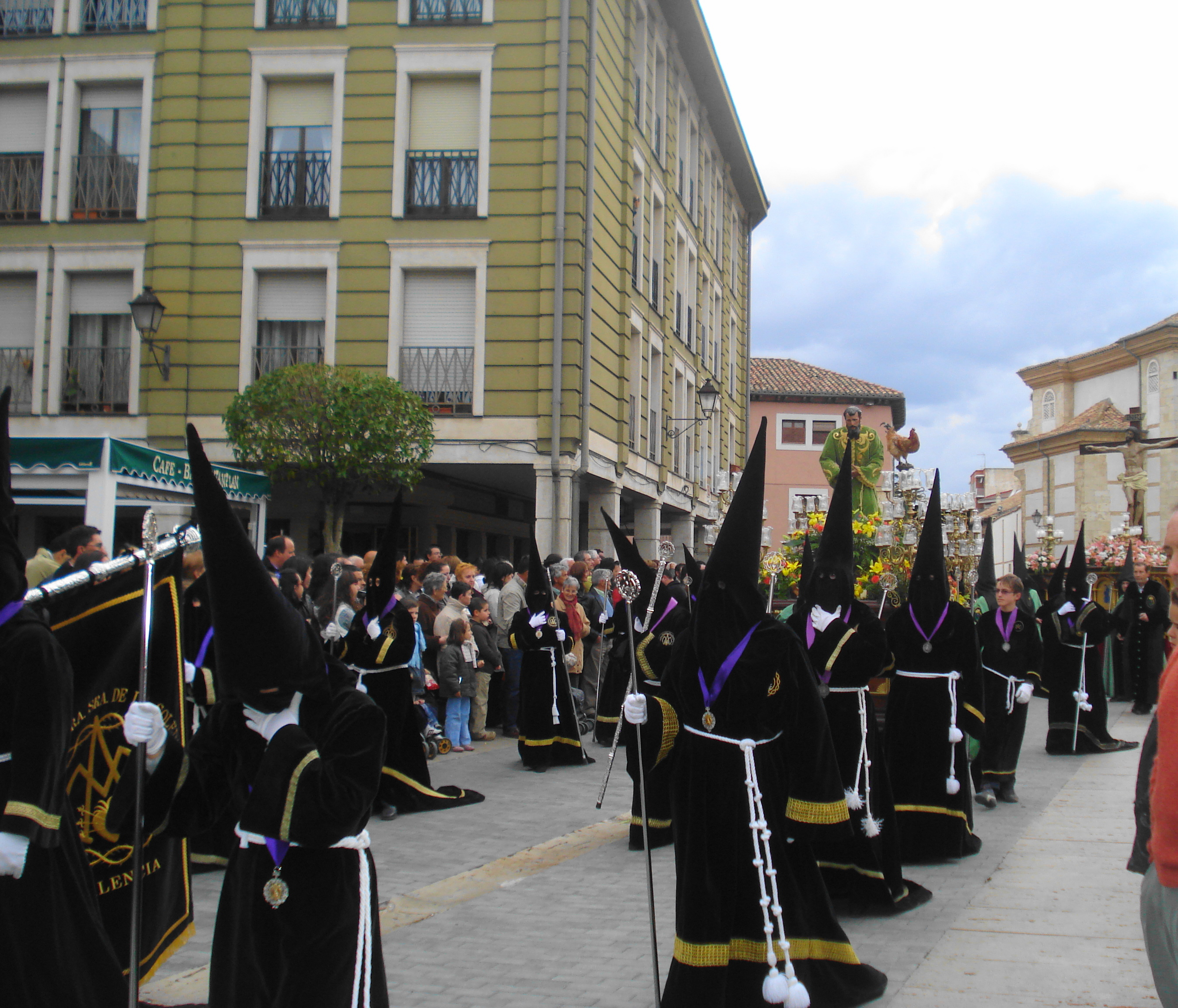 Hermanos de la Cofradía de Ntra. Sra. de la Soledad. Semana Santa en Palencia.